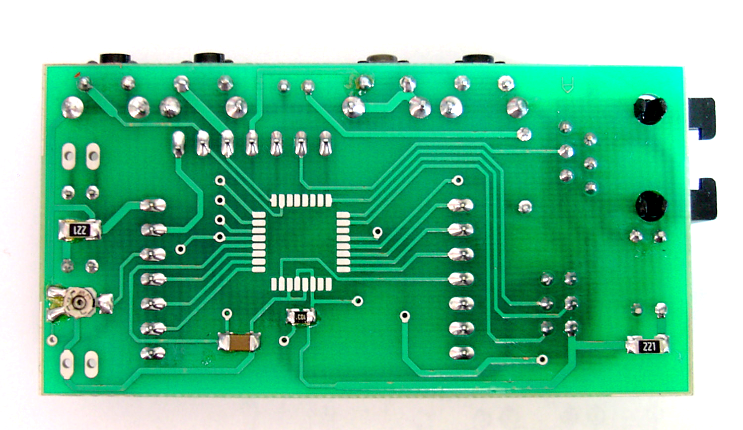 Plošný spoj - s montáží SMD